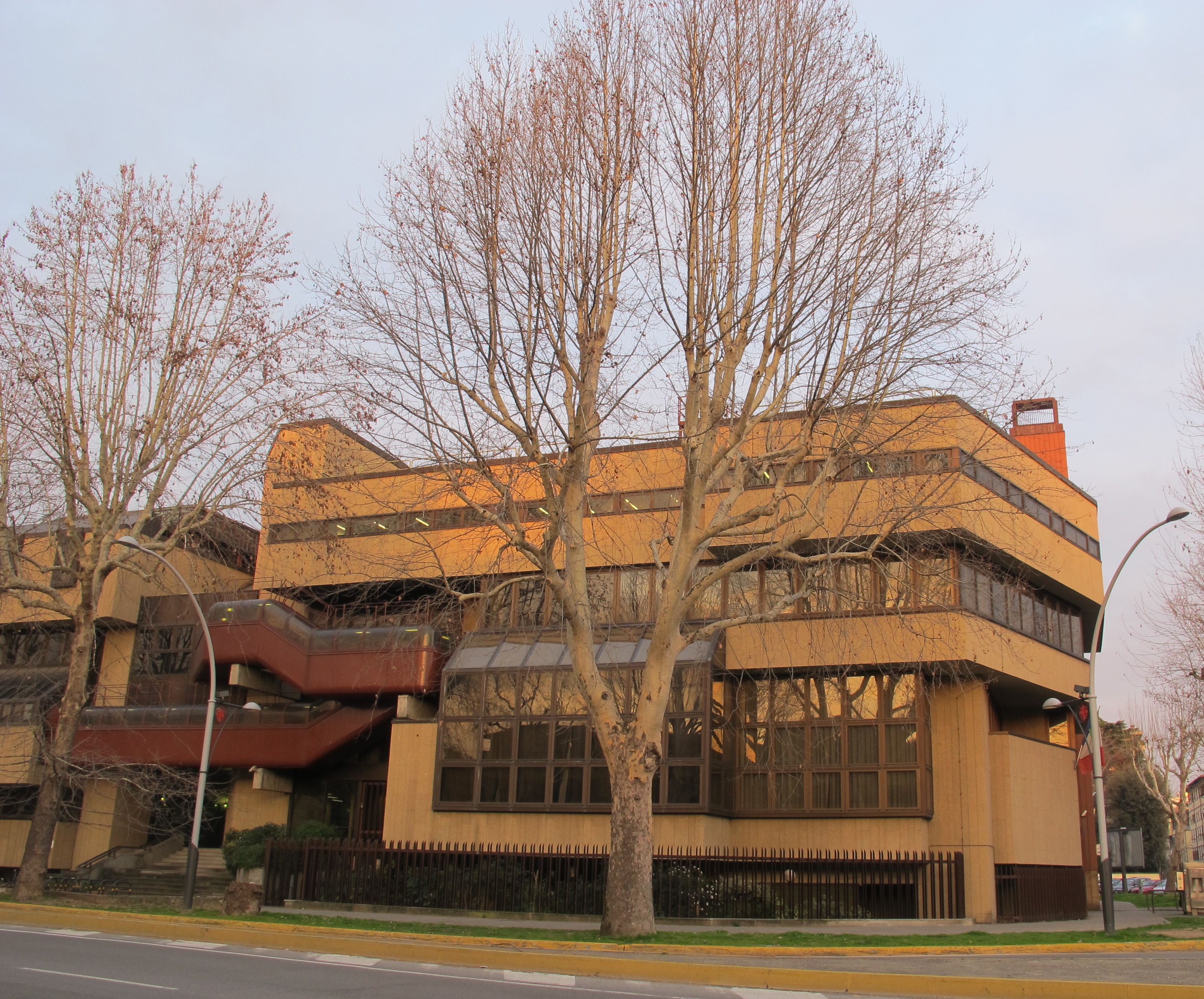 Archivio di stato di firenze, retro